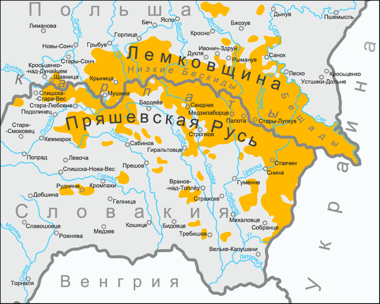 Карта расселения карпатских русинов, включая лемков, в 1919—1939 годах в границах современных Польши и Словакии. На основе данных: Дронов М. Ю. Роль Греко-католической церкви в формировании этнонациональной идентичности русинов Словакии (1919—1938) — диссертация на соискание ученой степени кандидата исторических наук. — Москва: Институт славяноведения РАН, 2013. — С. 269 Приложение № 1. Карта расселения карпатских русинов в 1919—1939 гг.; Маґочiй П. Р. Народ нивыдкы. Iлустрована iсторiя карпаторусинôв / По русинськы текст потовмачив Падяк В. — Ужгород: 2007. — С. 70.